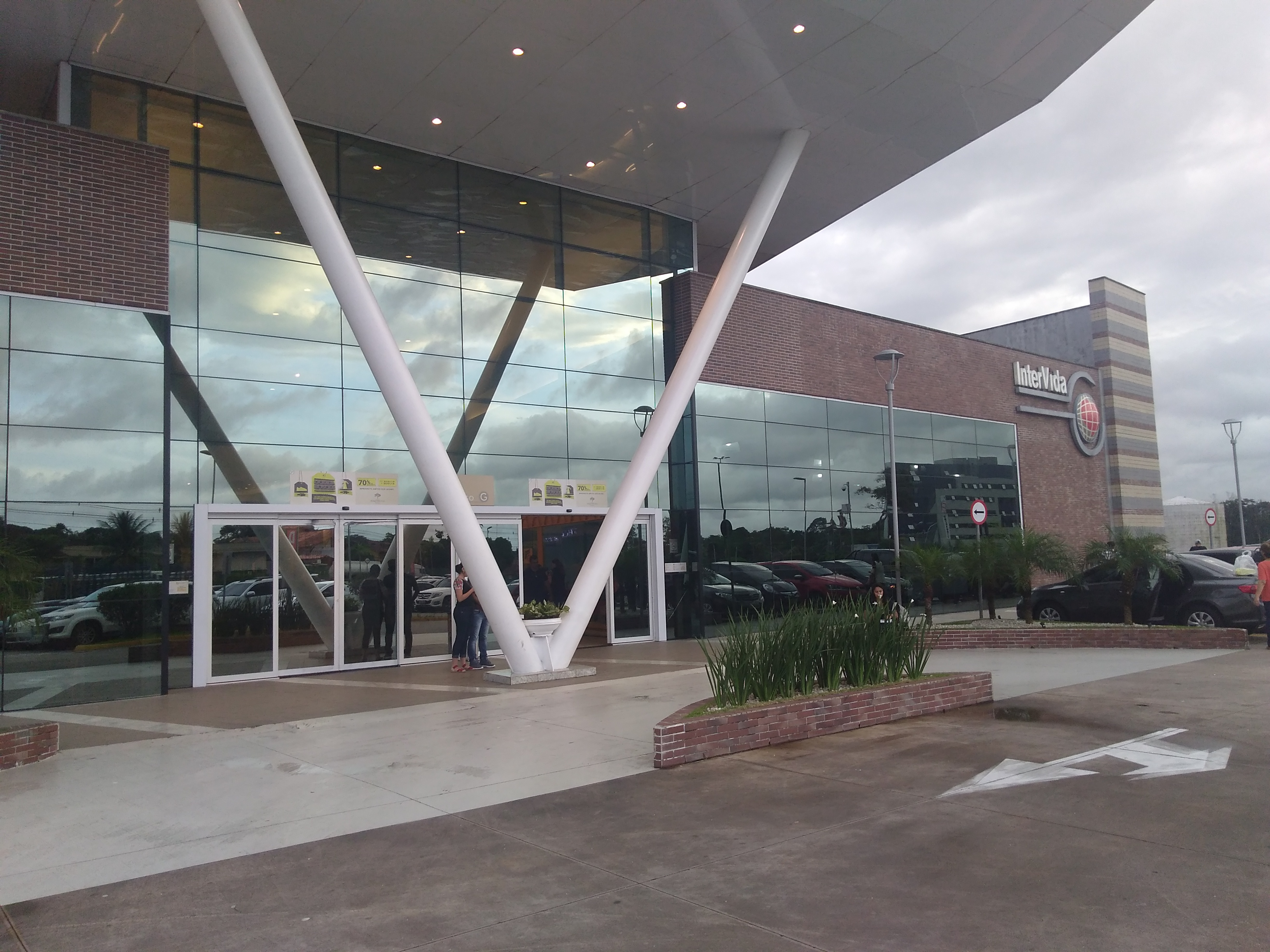 Foto da fachada do Shopping Bosque Grão-Pará de Belém, Pará